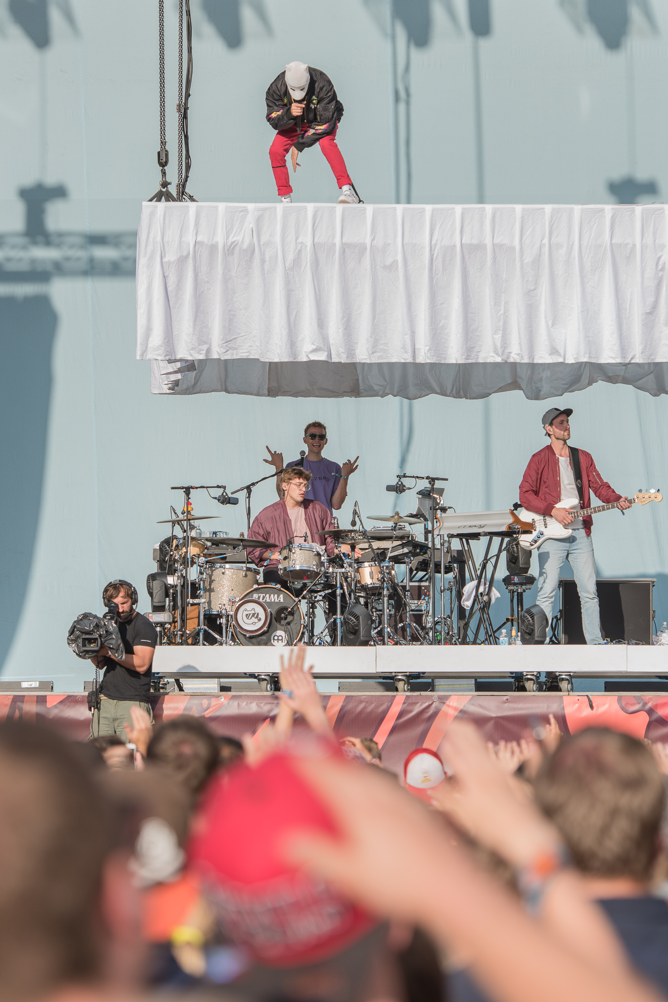 Cro,Deichbrand,ESK Events & Promotion GmbH,Festival,Fire Stage,Konzert,Livekonzert,Livemusik,Sea-Airport Cuxhaven/Nordholz,See-Flughafen Cuxhaven/Nordholz,Seeflughafen Cuxhaven/Nordholz